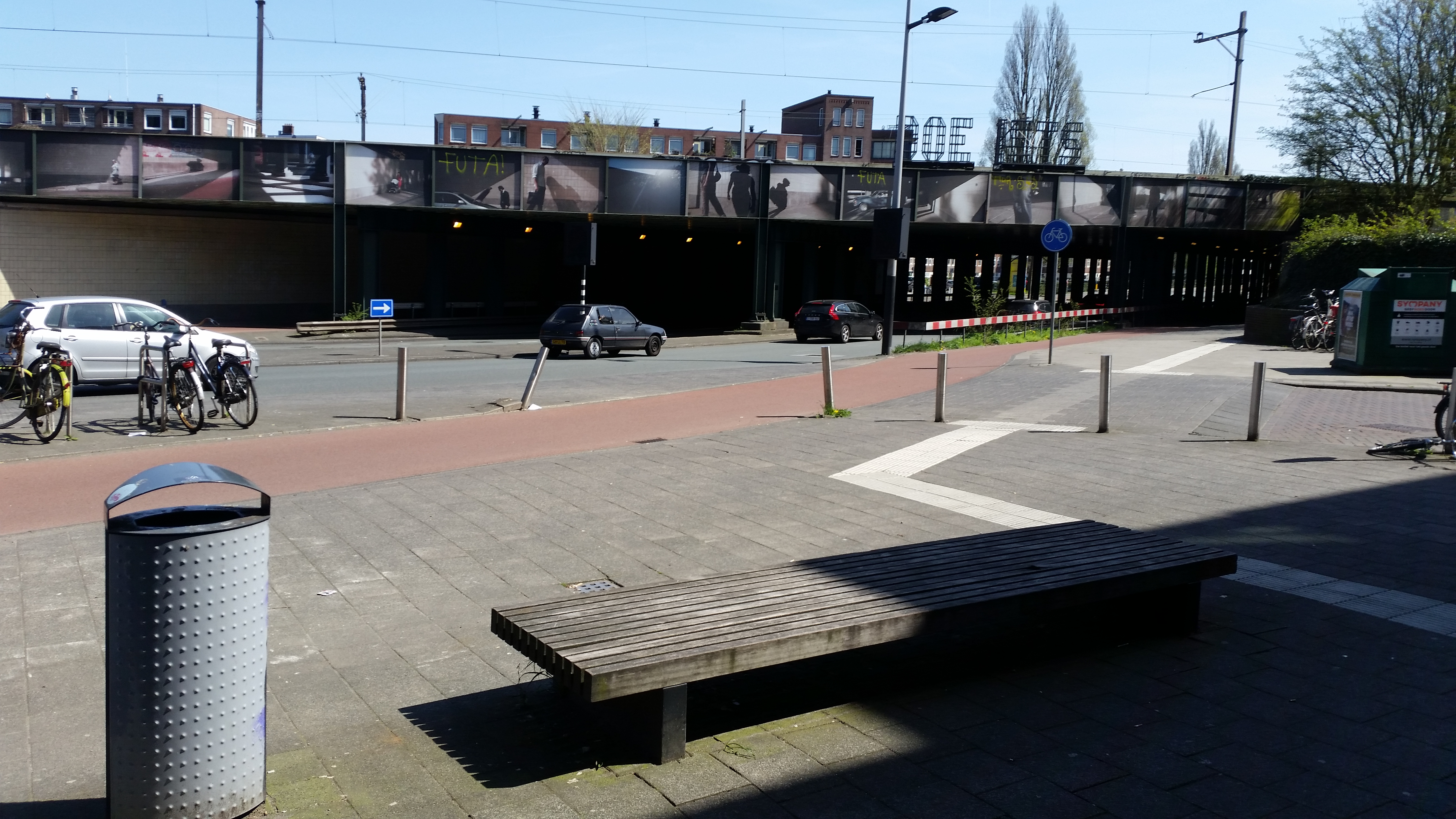 Wibautspoorbrug over de Wibautstraat